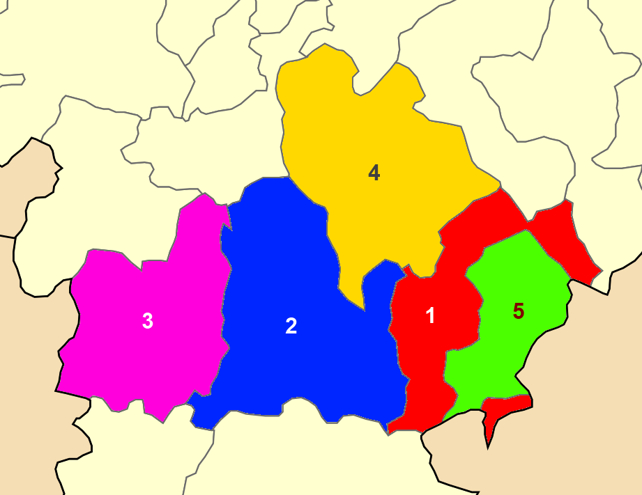 Χάρτης των ενοτήτων (πρώην δήμων) του Δήμου Κιλελέρ.